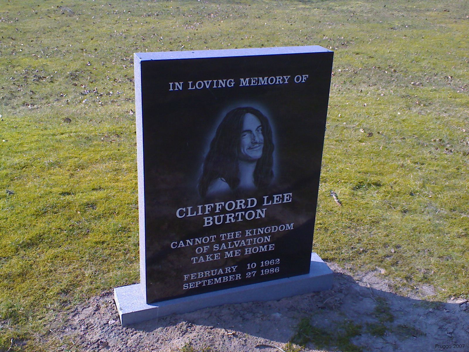 Това е мемориалната плоча,но не е там където е починал.Имах удоволствието да прекарам около месец в Люнгби и посетих мястото.Имам снимки на моя милост до паметната плоча,на мястото на инцидента .